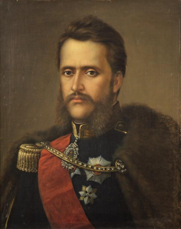 Portretul lui Alexandru Ioan Cuza, Ulei pe pânză, 59,5 x 48,5 cm, Nesemnat, Nedatat, Nr. inv. 72, Muzeul de Artă din Brașov